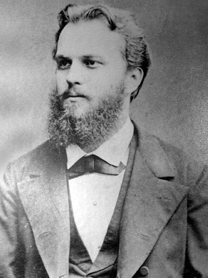 Константин Иречек (1854-1918)